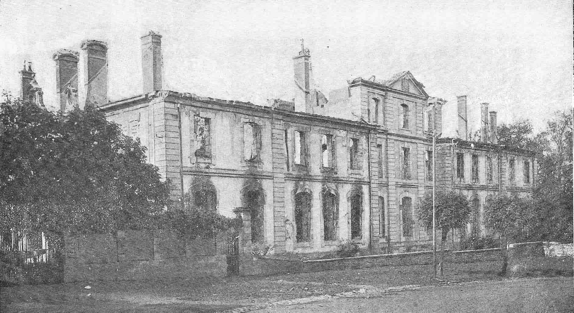 vue, sur une carte postale, du Château du marquis de Lambertye, brulé pendant la Première Guerre mondiale.